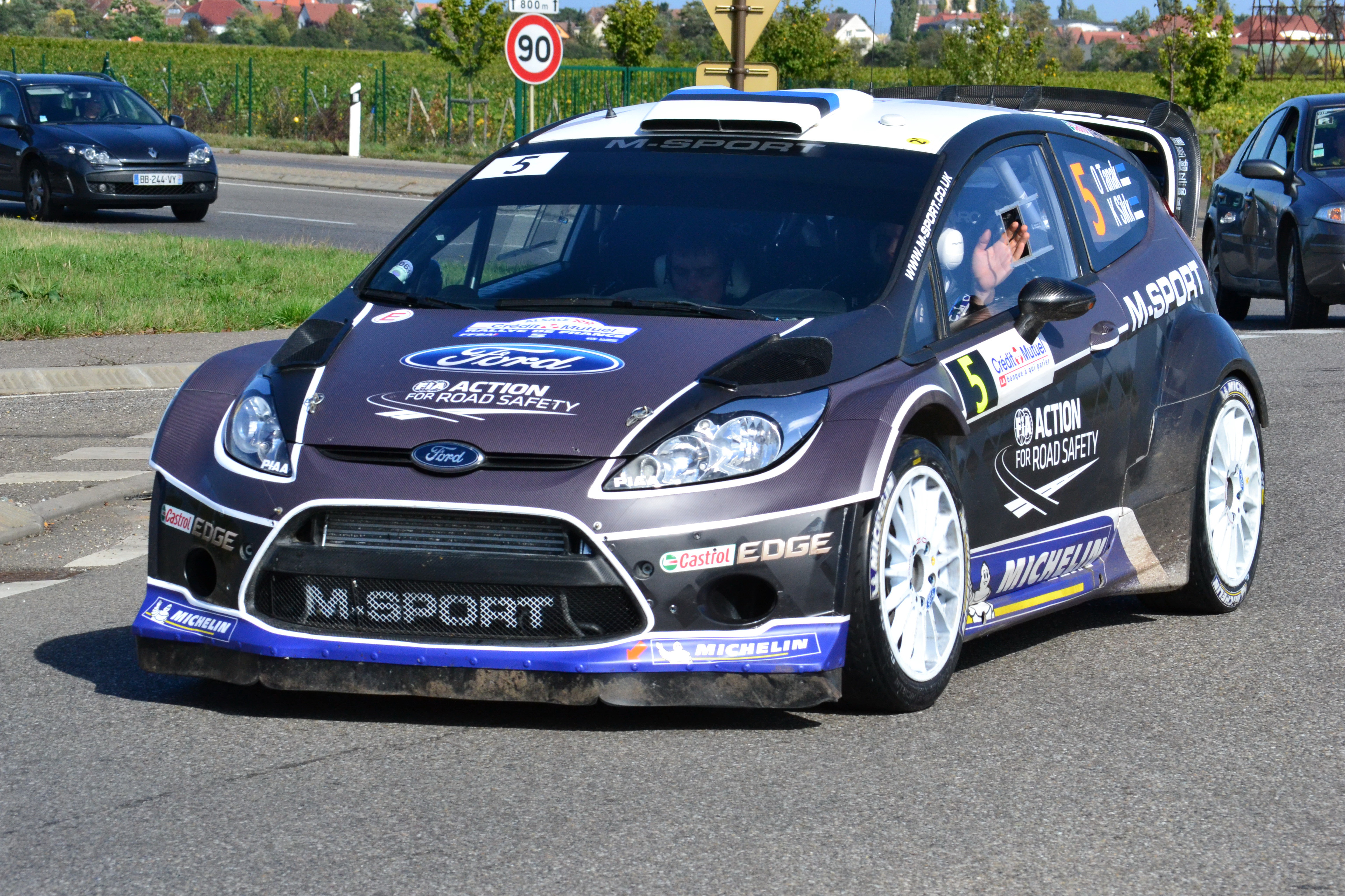 Ott Tänak sur la route de liaison entre le parc d'assistance de Colmar et l'ES5 Hohlandsbourg-Firstplan 2 durant le Rallye de France-Alsace 2012.